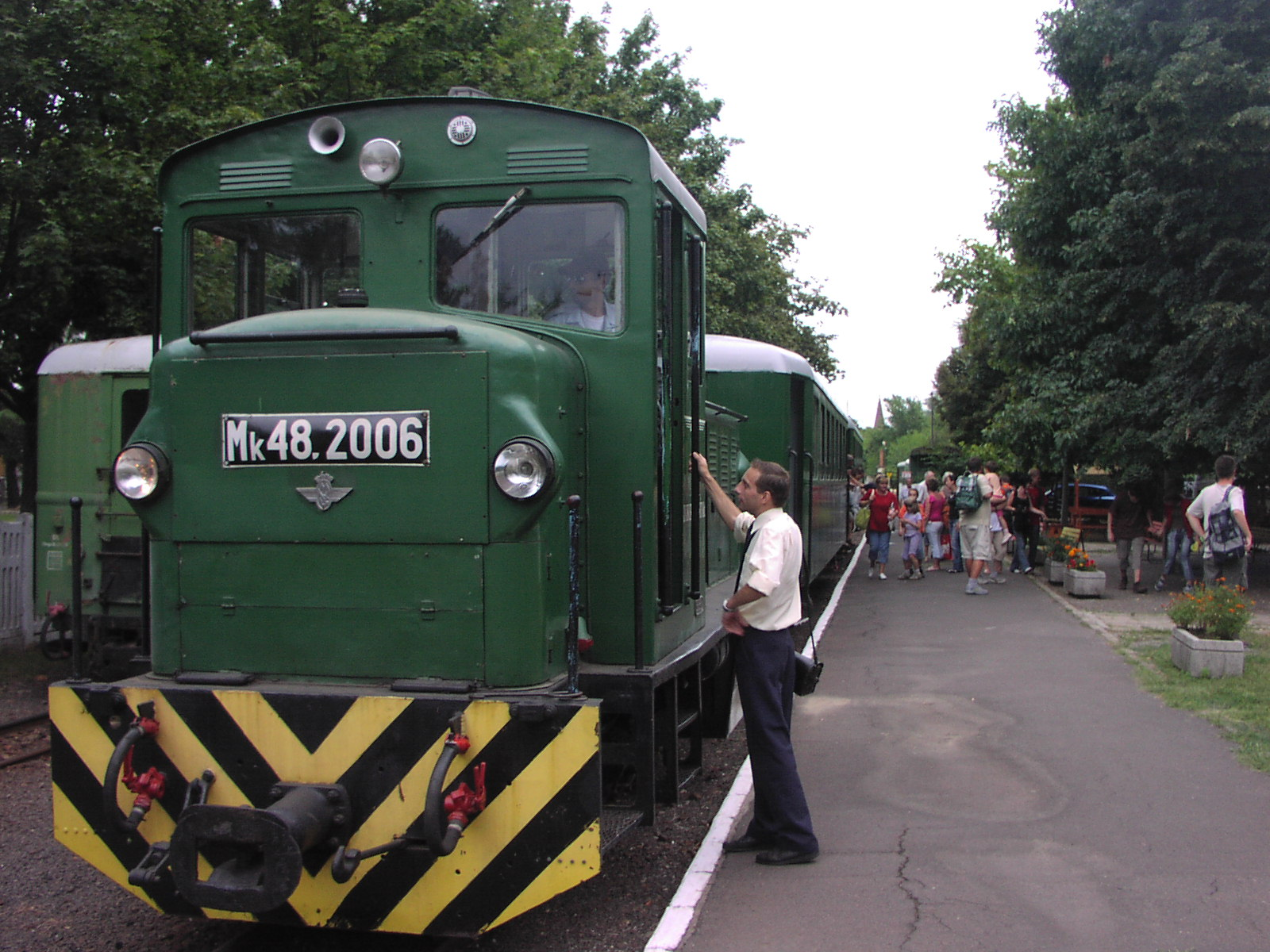 A Zsuzsi Erdei Vasút szerelvénye a debreceni végállomáson